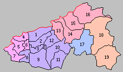 京都府相楽郡の町村制時点の町村。